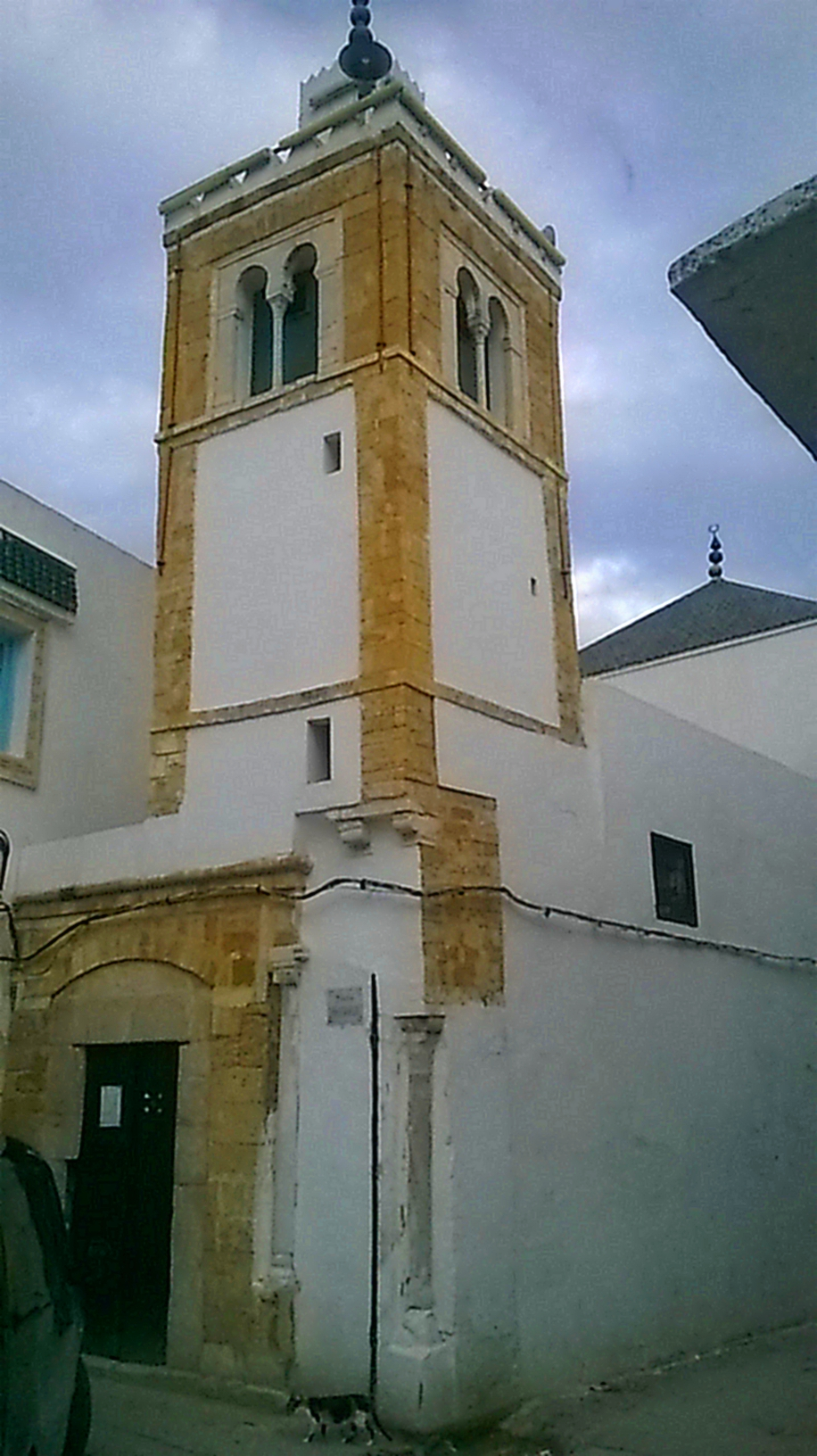 Sidi El Béchir , Tunis سيدي البشير ، تونس